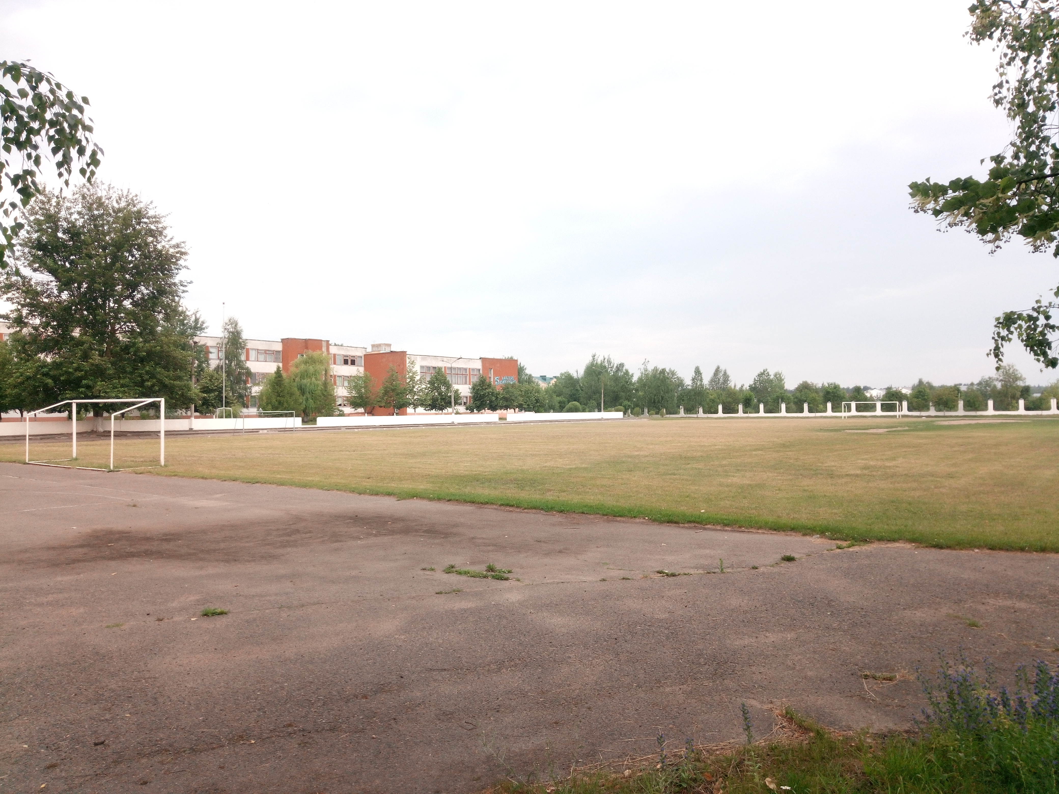 Школьны стадыён